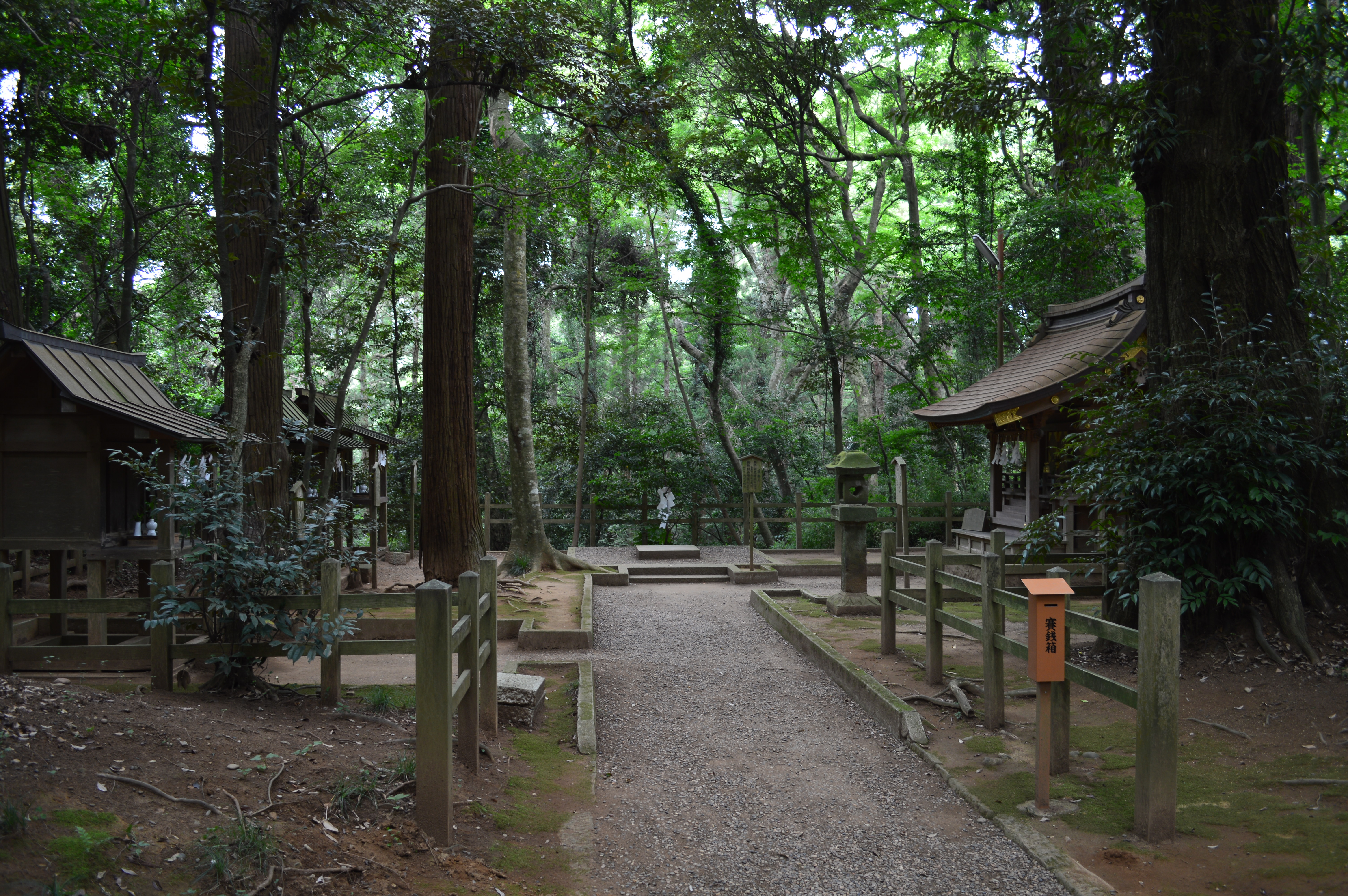 鹿島神宮 末社群と遥拝所